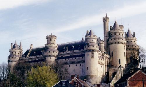 Cette photographie du château de Pierrefonds (Oise, France) a été prise par Utilisateur:Valéry Beaud en mars 2002 et mise sous licence GNU FDL dès la première publication. Appareil photo: Canon A-1, zoom FD70-210mm f/4, pellicule 200 ISO. Photographie prise en fin de matinée depuis le parking en contrebas.